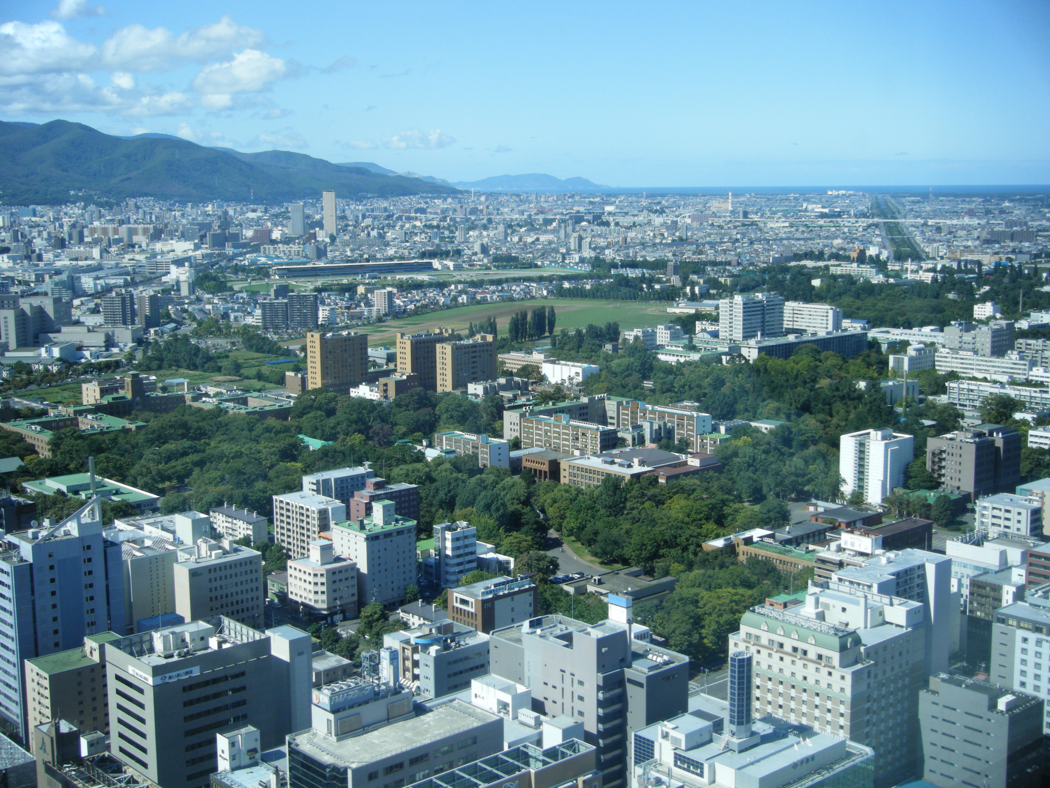 北海道大学俯瞰図。JRタワーより。